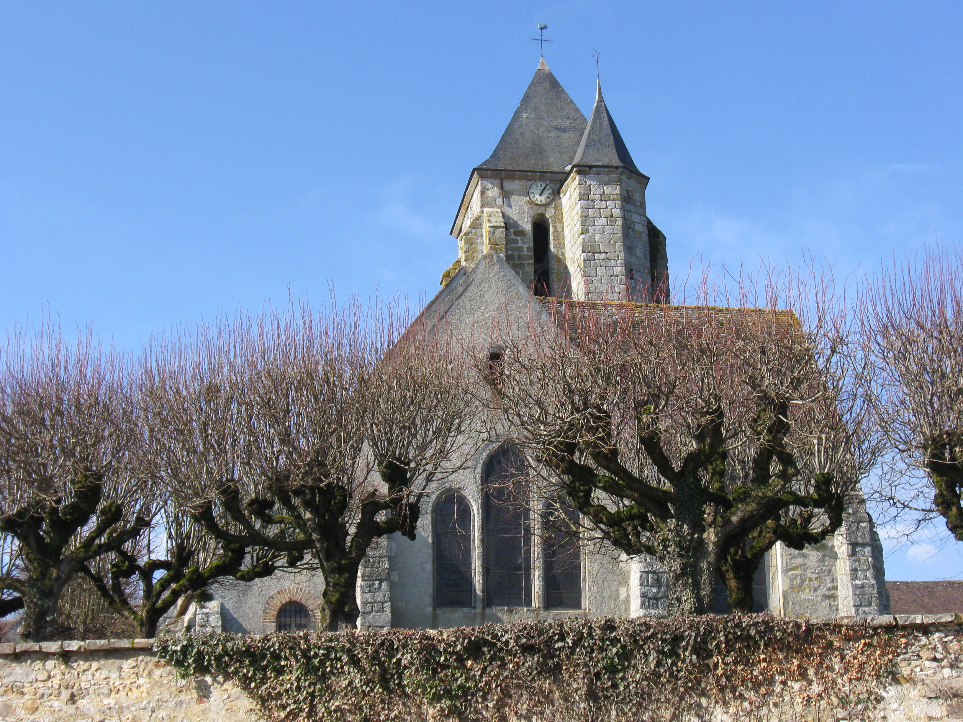 Église Saint-Martin de Dormelles. (Seine-et-Marne, région Île-de-France).